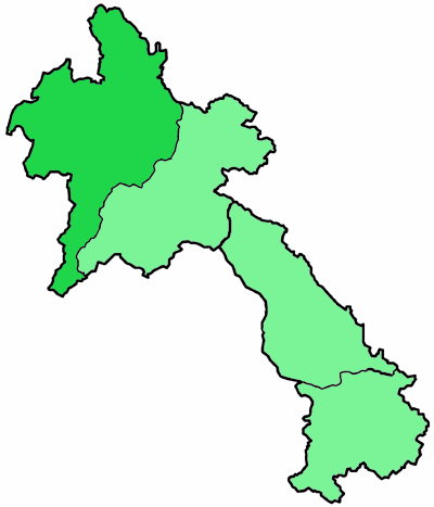 Mappa del Vicariato Apostolico cattolico di Luang Prabang, in Laos. Lavoro personale, eseguito a partire da questa immagine di Commons. Fonte per i confini delle diocesi: Guida delle missioni cattoliche 2005, a cura della Congregatio pro gentium evangelizatione, Roma, Urbaniana University Press, 2005. Categoria:Chiesa cattolica in Laos